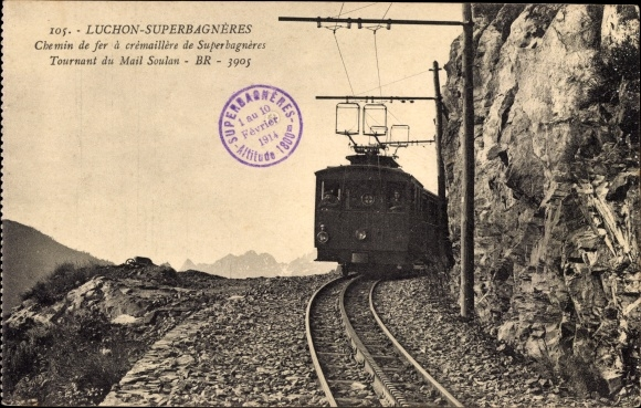 Chemin de fer à crémaillère Luchon-Superbagnères